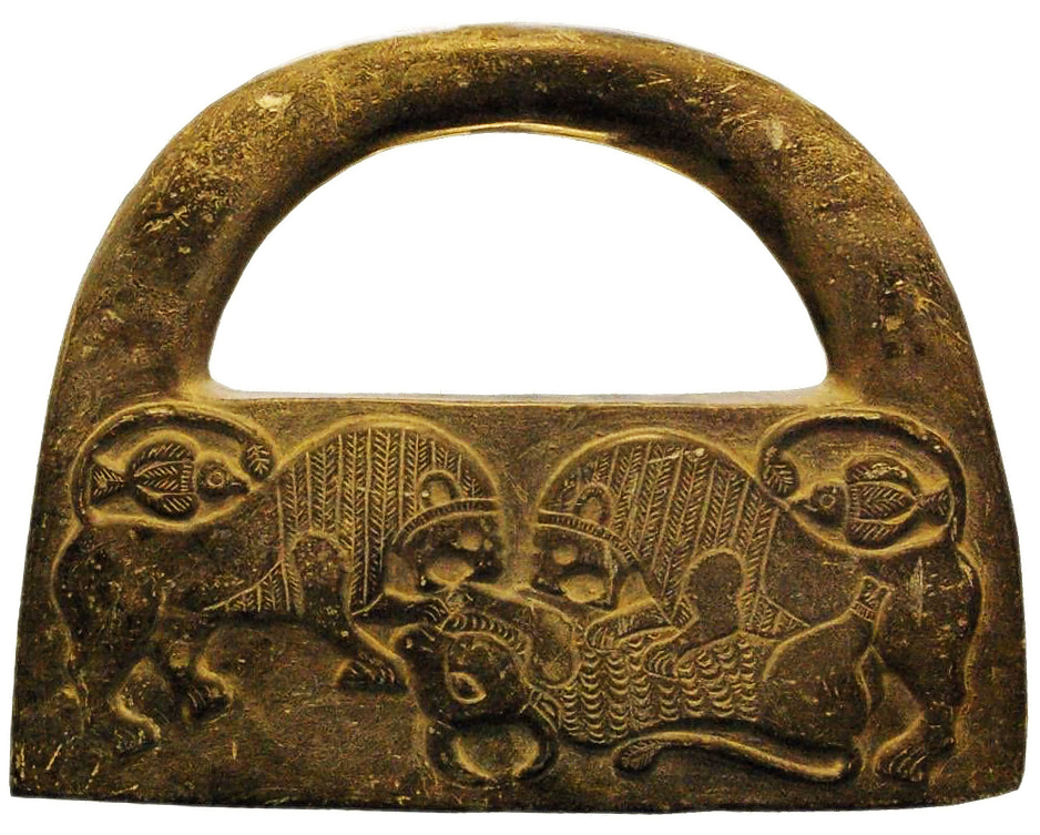 اثر سنگ صابونی از جیرفت، هزاره سوم پ.م، برگرفته از: طاهری، صدرالدین (1391)، کهن الگوی شیــر در ایران، میانرودان و مصر باستان؛ نشریه هنرهای زیبا، شماره 49.